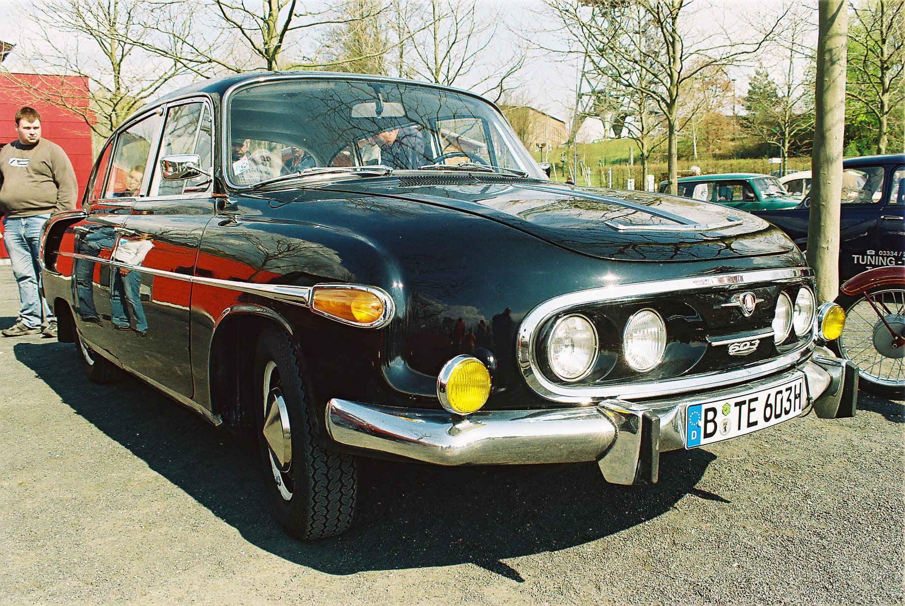 Tatra 603